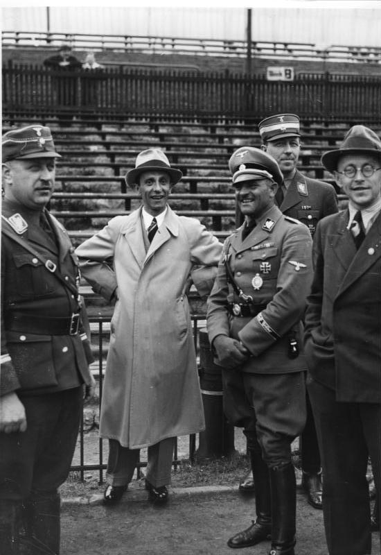 Generalprobe zum 1. Mai im Poststadion Reichsminister Dr. Goebbels lässt sich die Lautsprecheranlage vorführen v.l.n.r.: SA-Oberführer Schäfer, Dr. Goebbels, Sepp Dietrich, hinter Sepp Dietrich Polizeipräsident Graf Helldorf